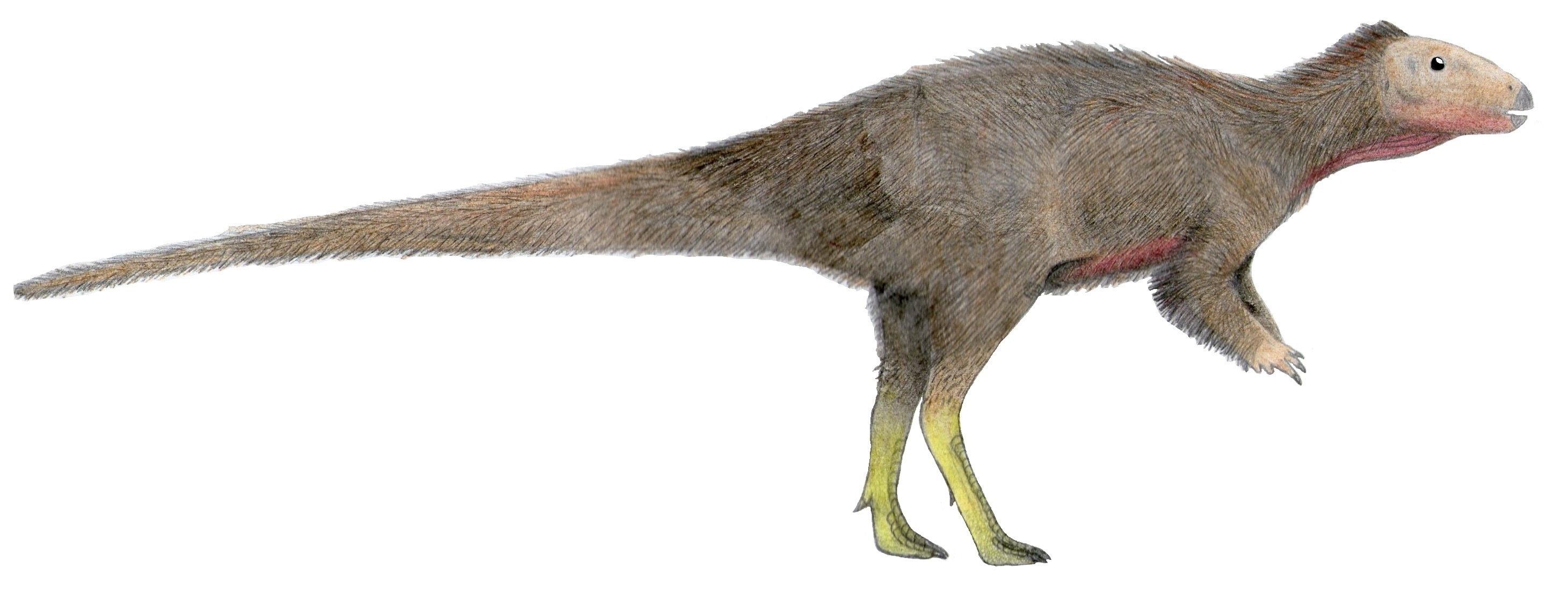 Recreación de una Trinisaura